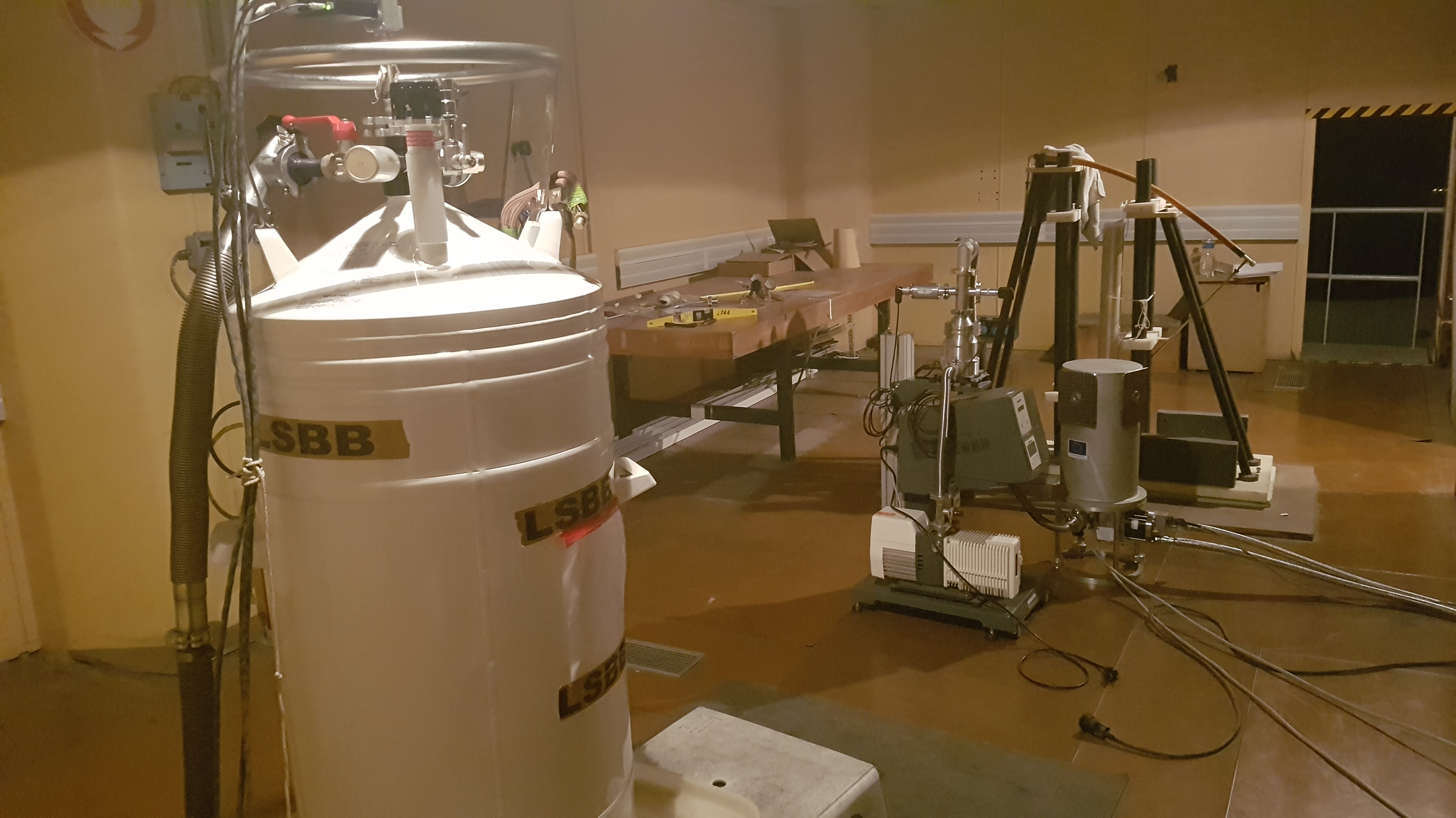 Magnétomètre